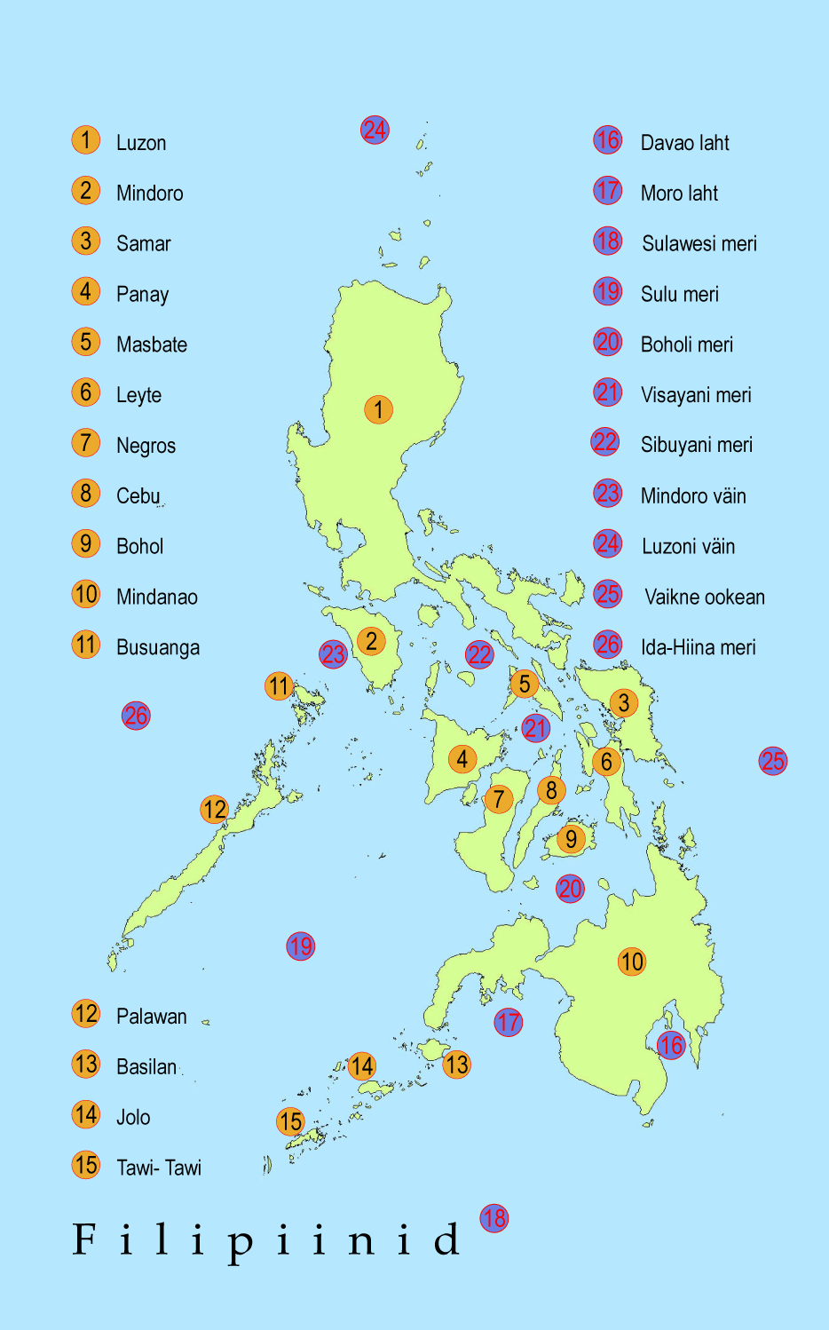 Filipiinide kaart